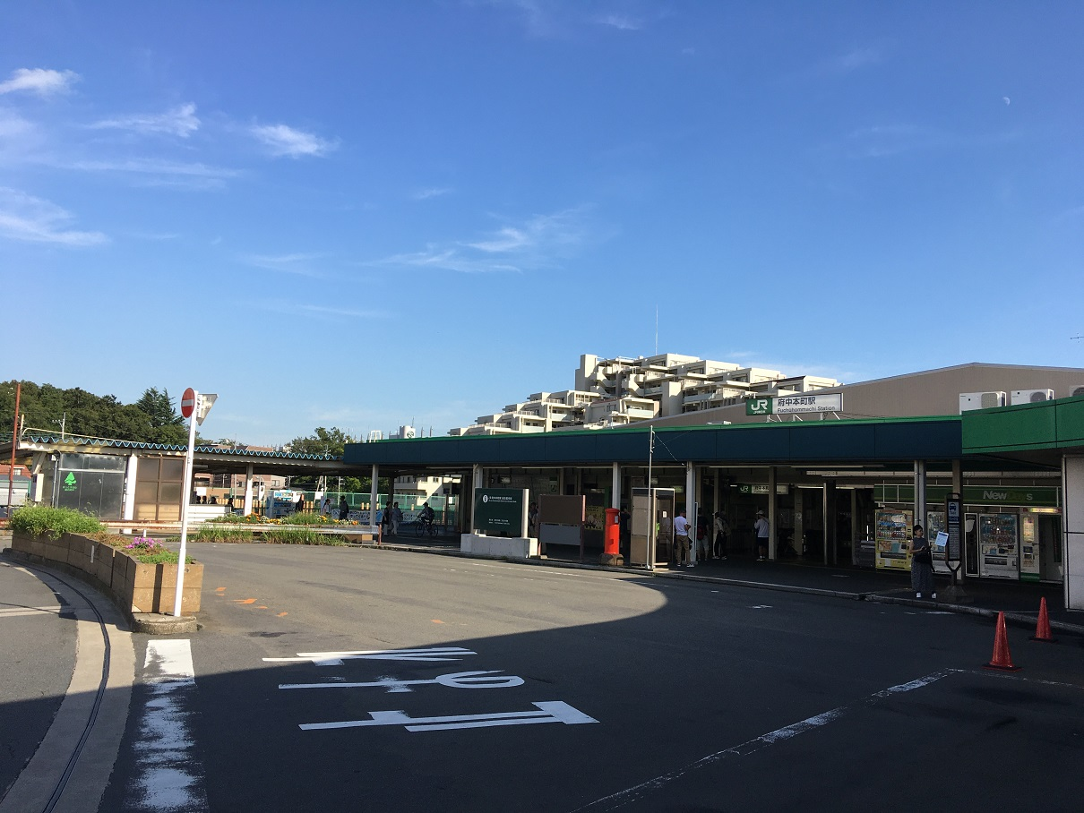 駅ロータリー側より撮影